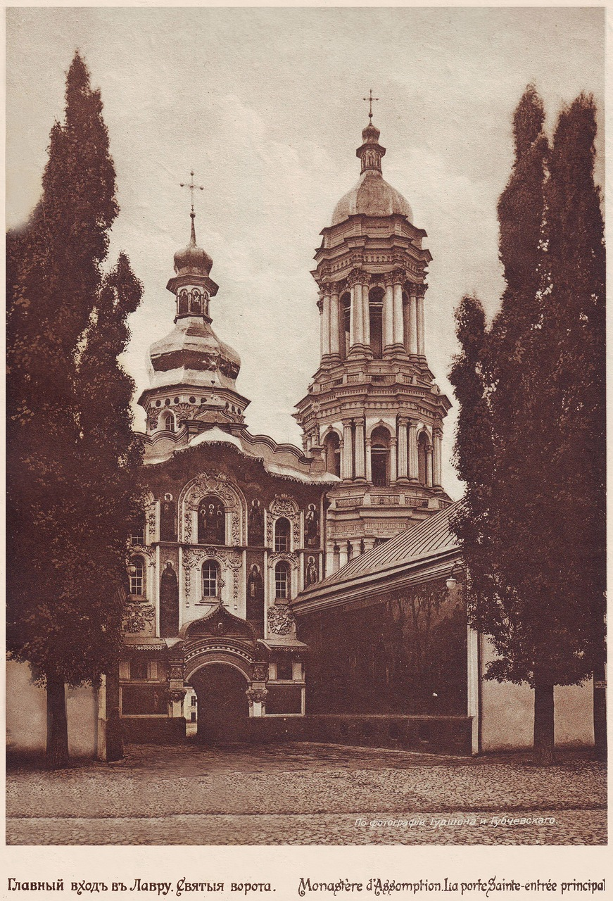 Вхід до Лаври. Святі ворота (Entrance to Kyiv Pechersk Lavra, Saint gates) 1911